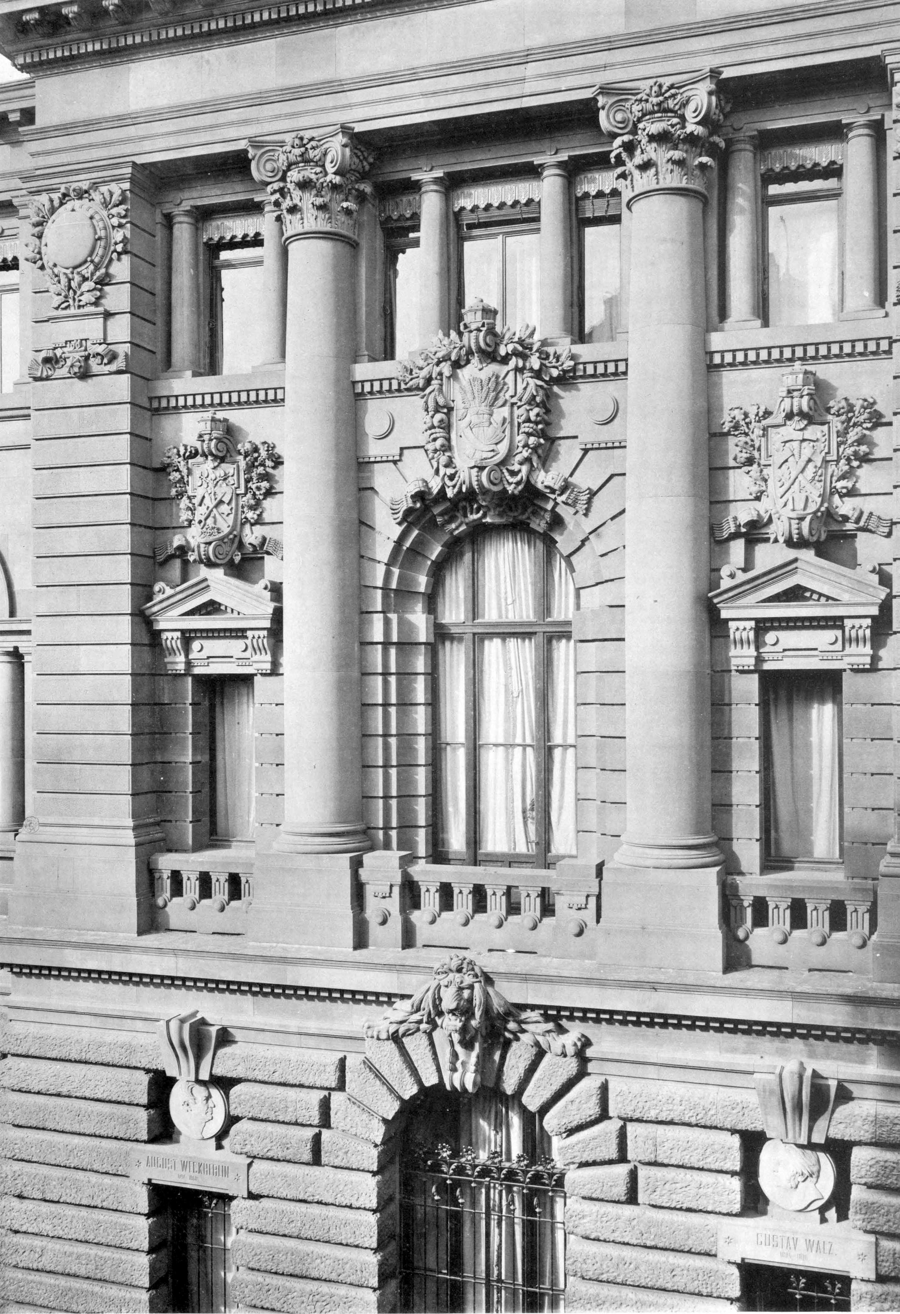 Landesgewerbemuseum Stuttgart, hinterer Flügel an der Kienestraße, rechter Risalit. Die drei Fensterschlusssteine tragen in den Kartuschen Wappenschilde, die den Gartenbau, den Feldbau und den Landbau symbolisieren.